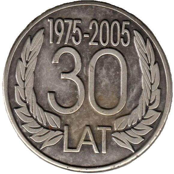 Medal pamiątkowy z okazji 30. rocznicy powstania 22 Polowej Technicznej Bazy Przeciwlotniczej - awers